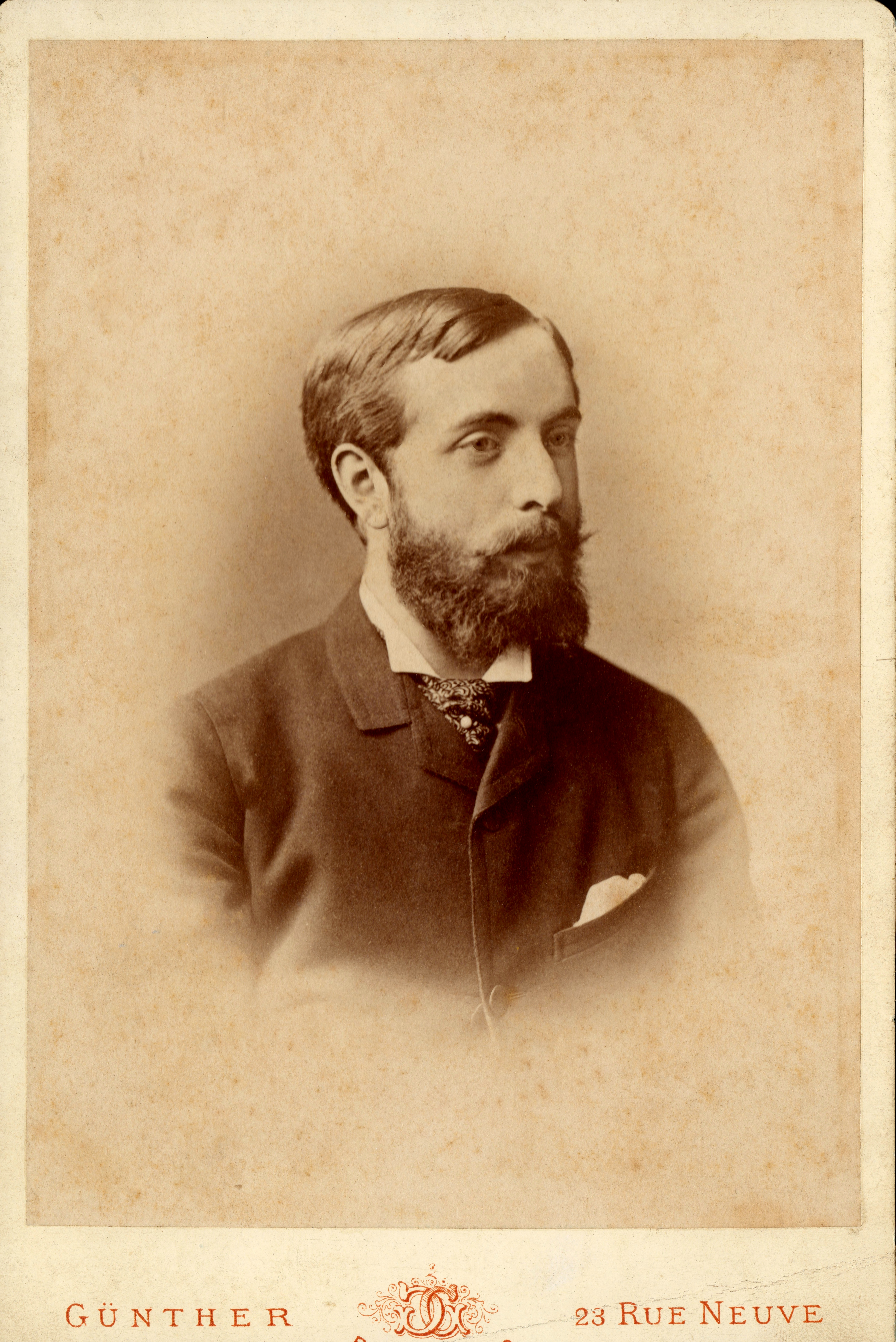 Georg von Eppinghoven